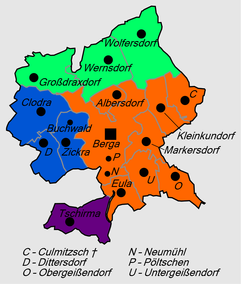 Gliederung der Stadt Berga/Elster ab 1. Juni 1991